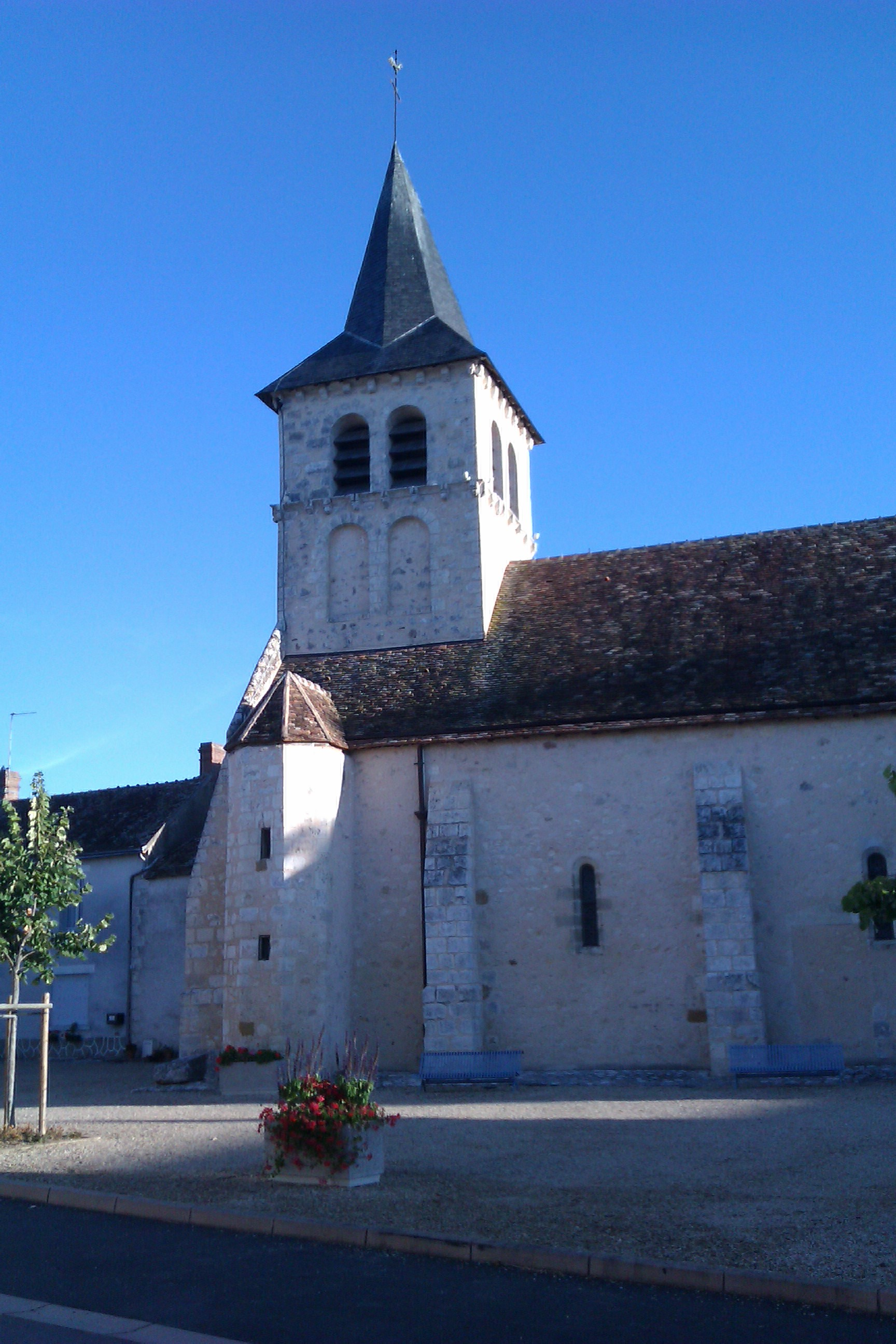 Église Saint-Ambroix de Douadic .